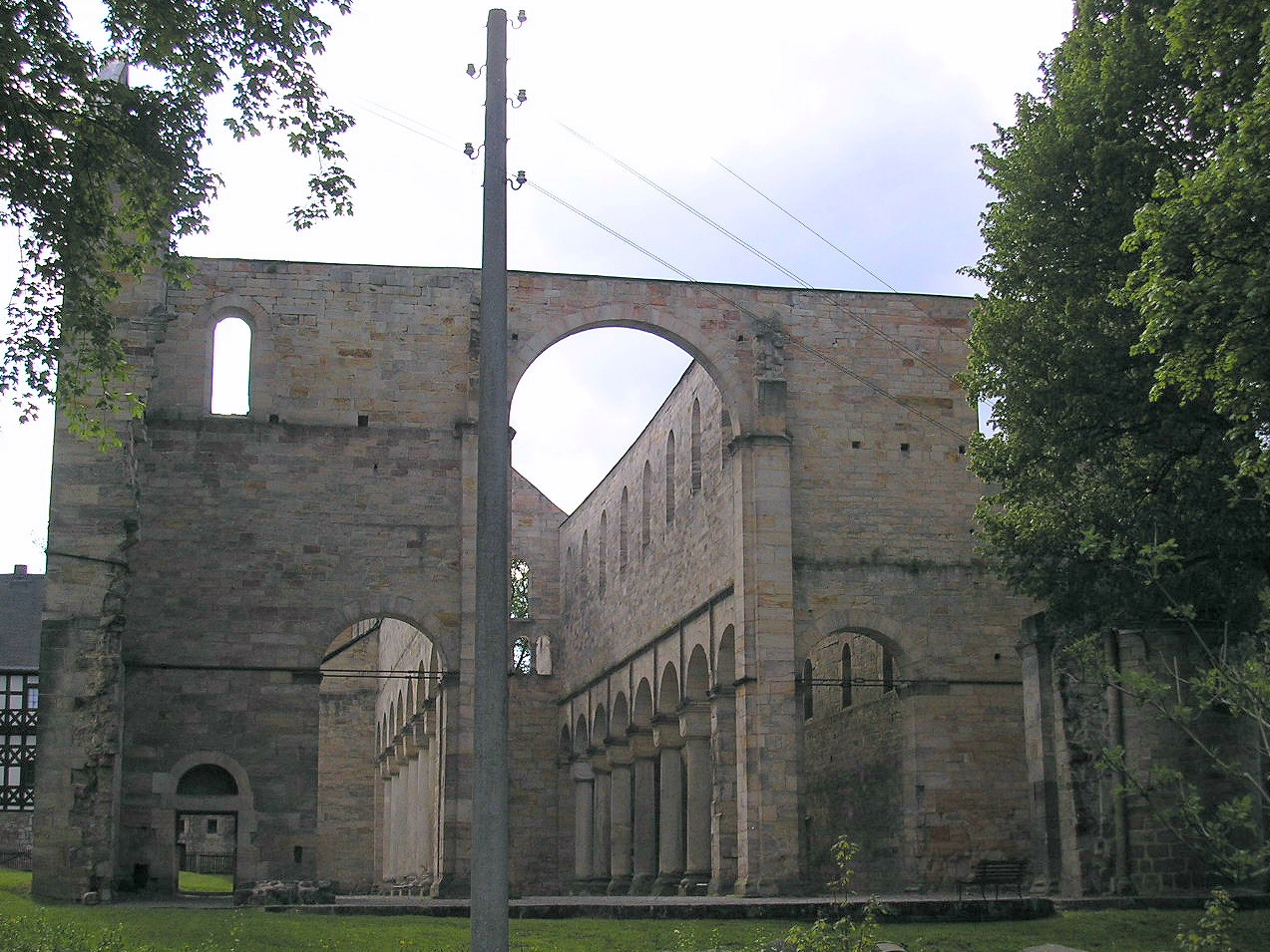 Blick von Osten in die Klosterruine Paulinzella (Thüringen).